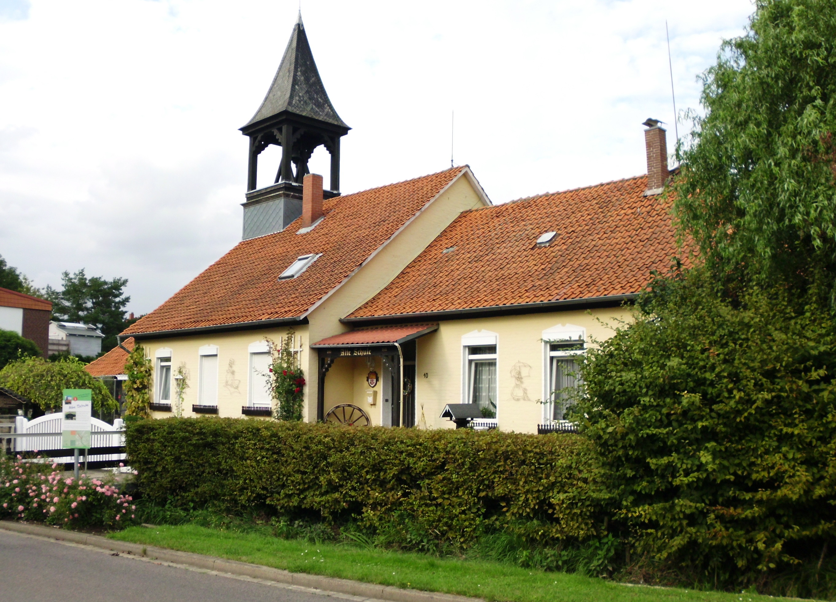 Die Alte Schule Bredenbeck befindet sich in 30974 Wennigsen, An der Beeke 10 Deutschland Niedersachsen